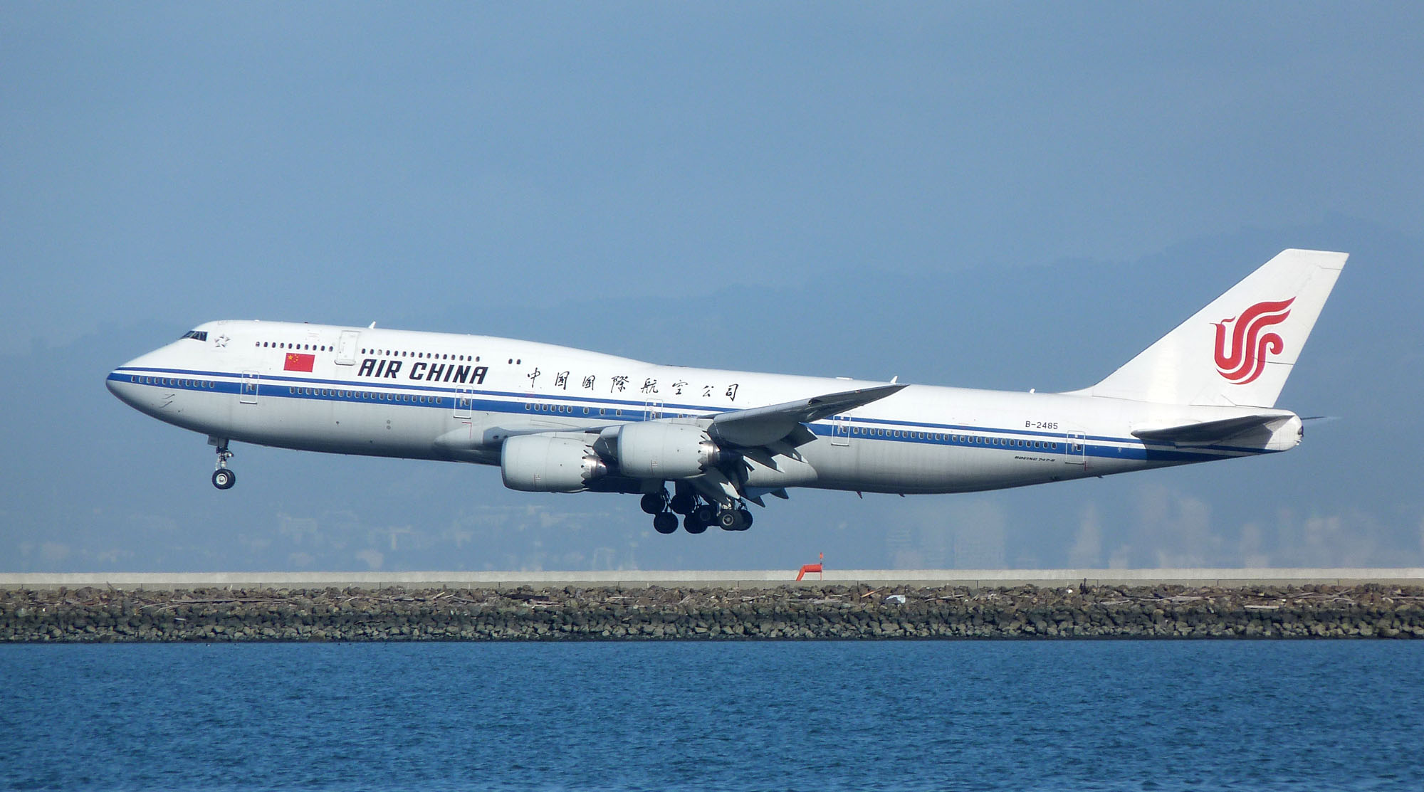 AirChina 12415